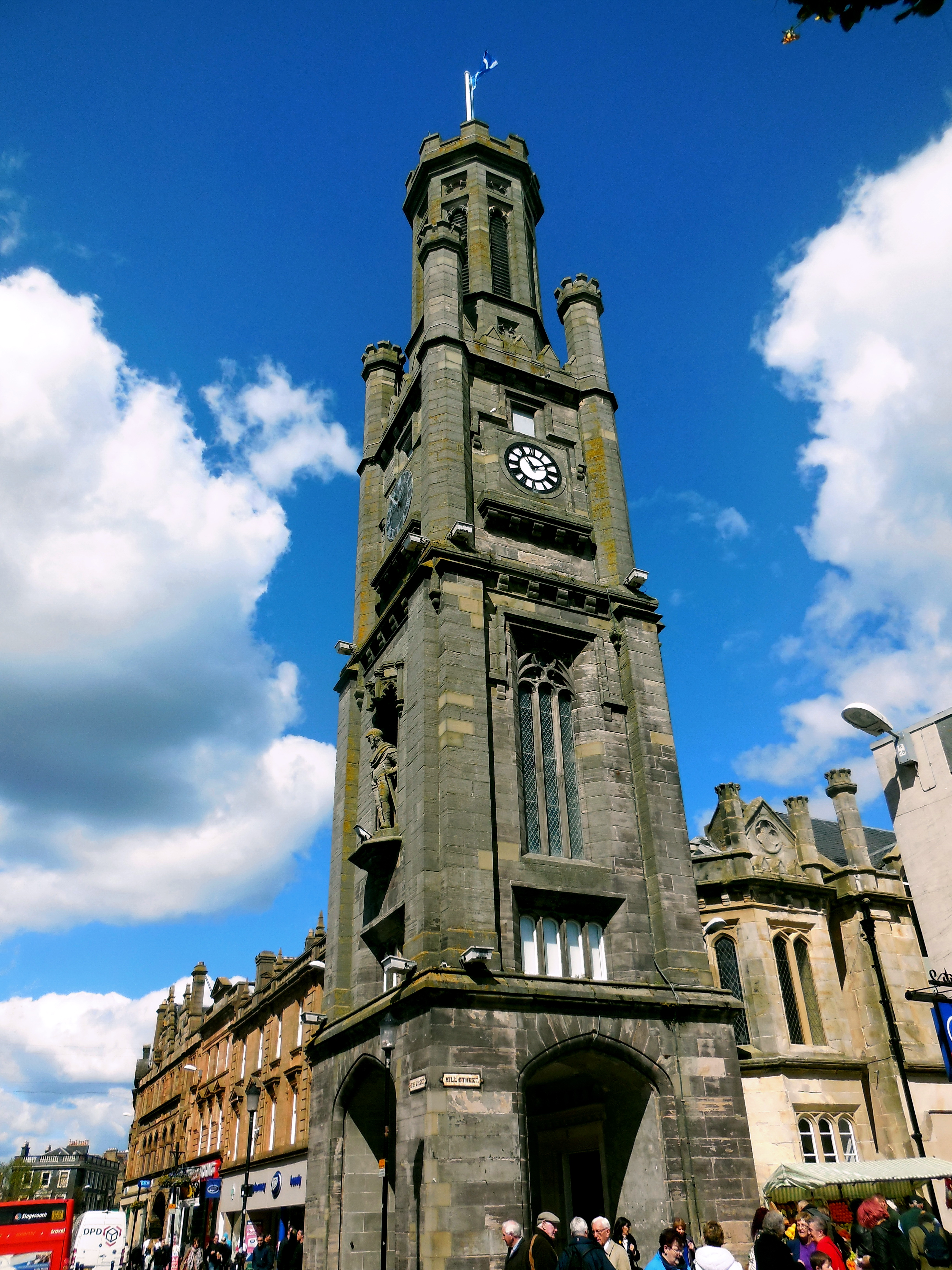 AYR